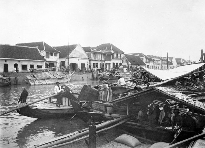 Repronegatief. Kali Mas, handelswijk, Soerabaia